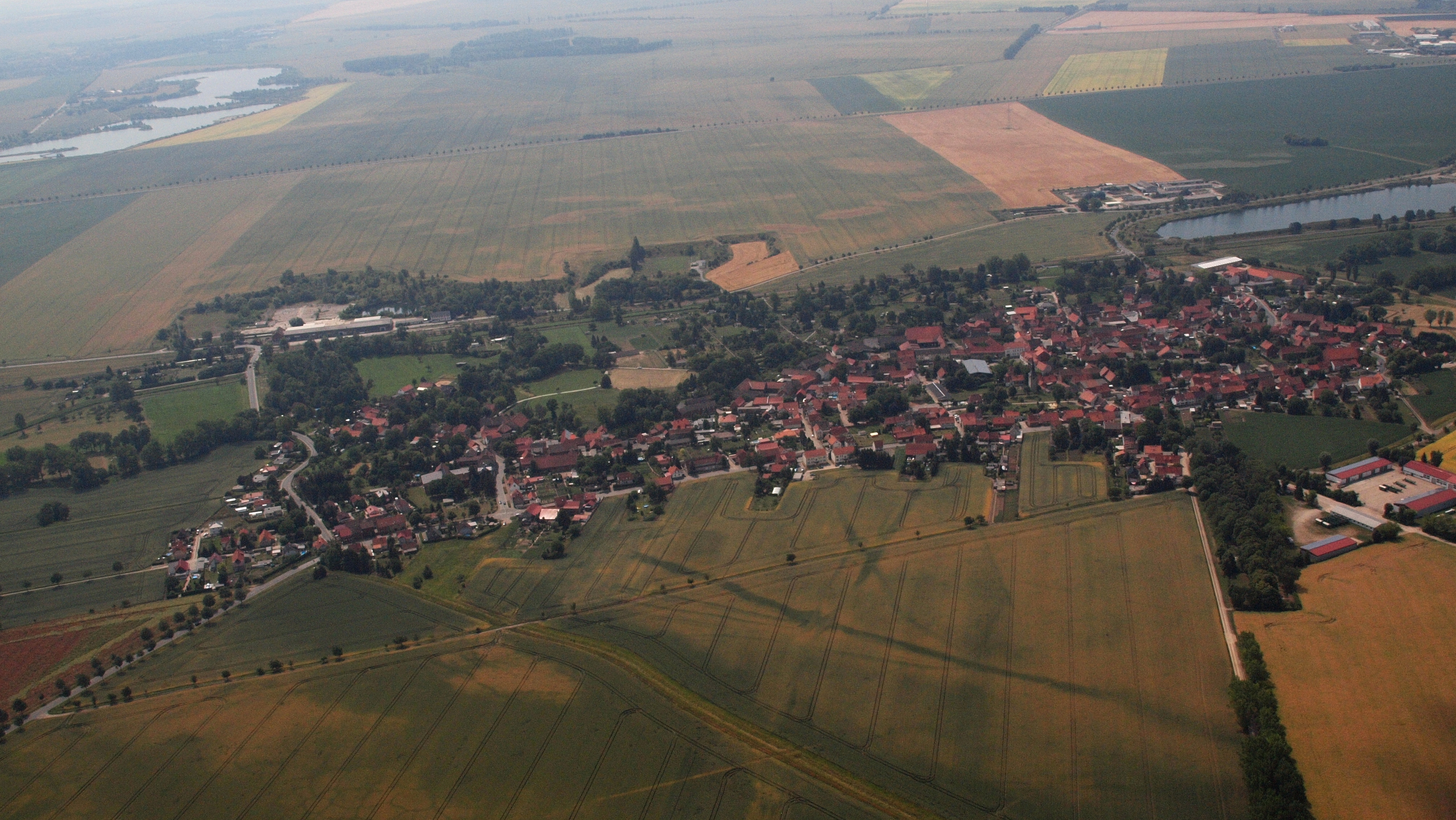 Groß Quenstedt, Luftaufnahme (2015)